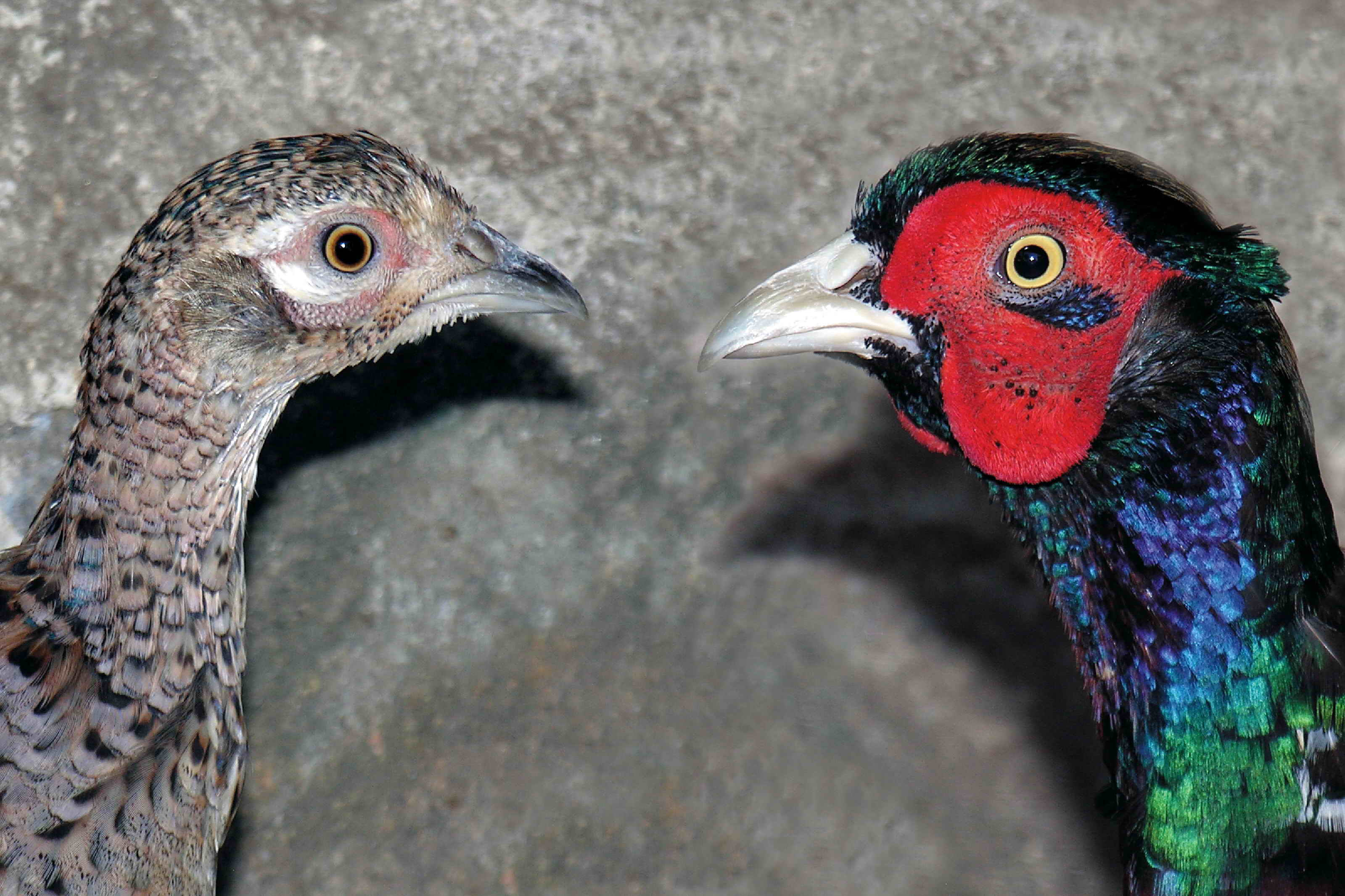 Phasianus colchicus Faisán. Teaño - Cuntis - Galicia - Spain